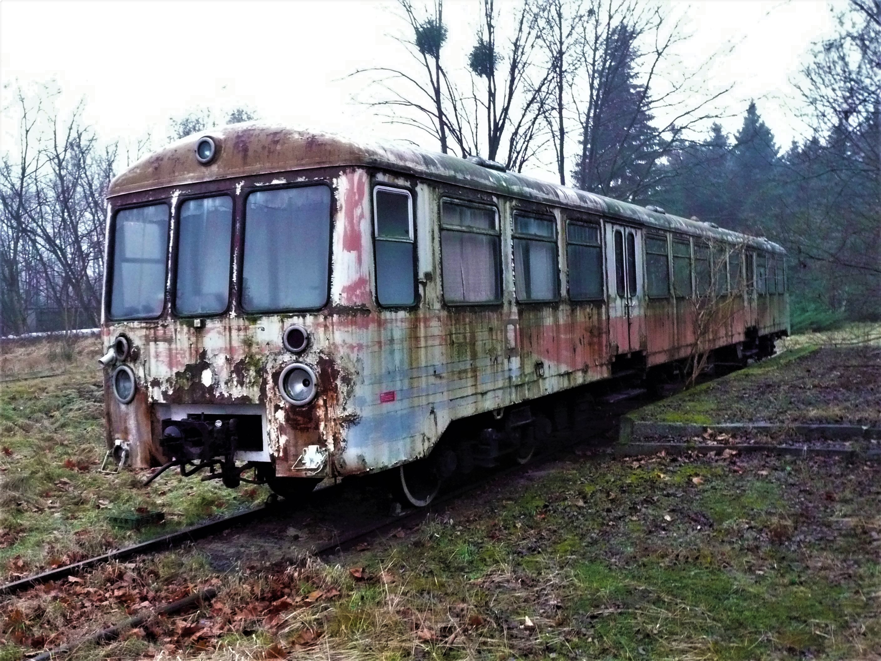 Vorderansicht links des VT 4.12.01